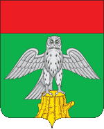 Герб Киржачского района Владимирской области